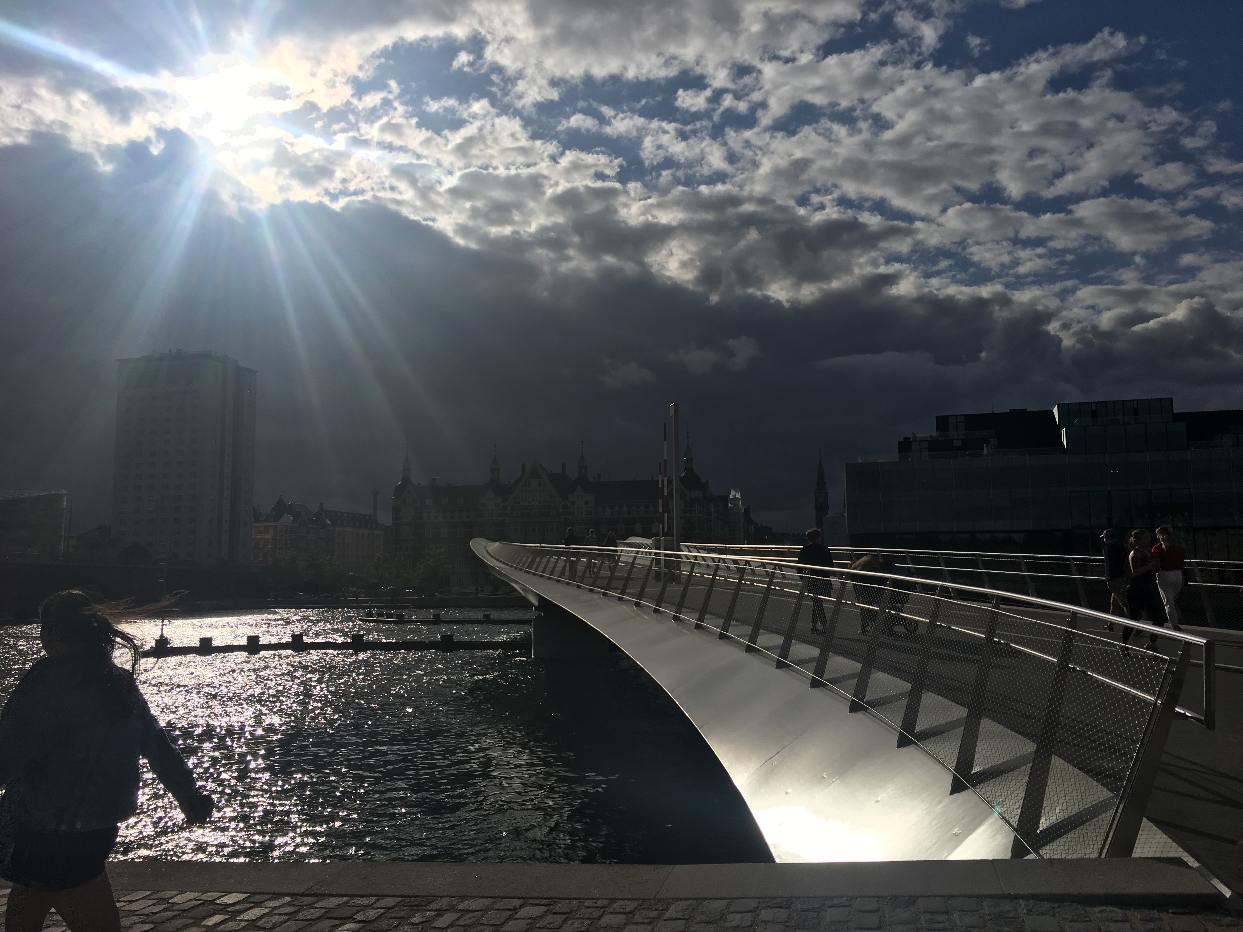 Lille Langebro set fra Christianshavn